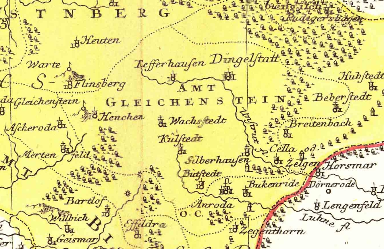 Ausschnitt aus der historischen Karte "Tractus Eichsfeldiae": das Amt Gleichenstein